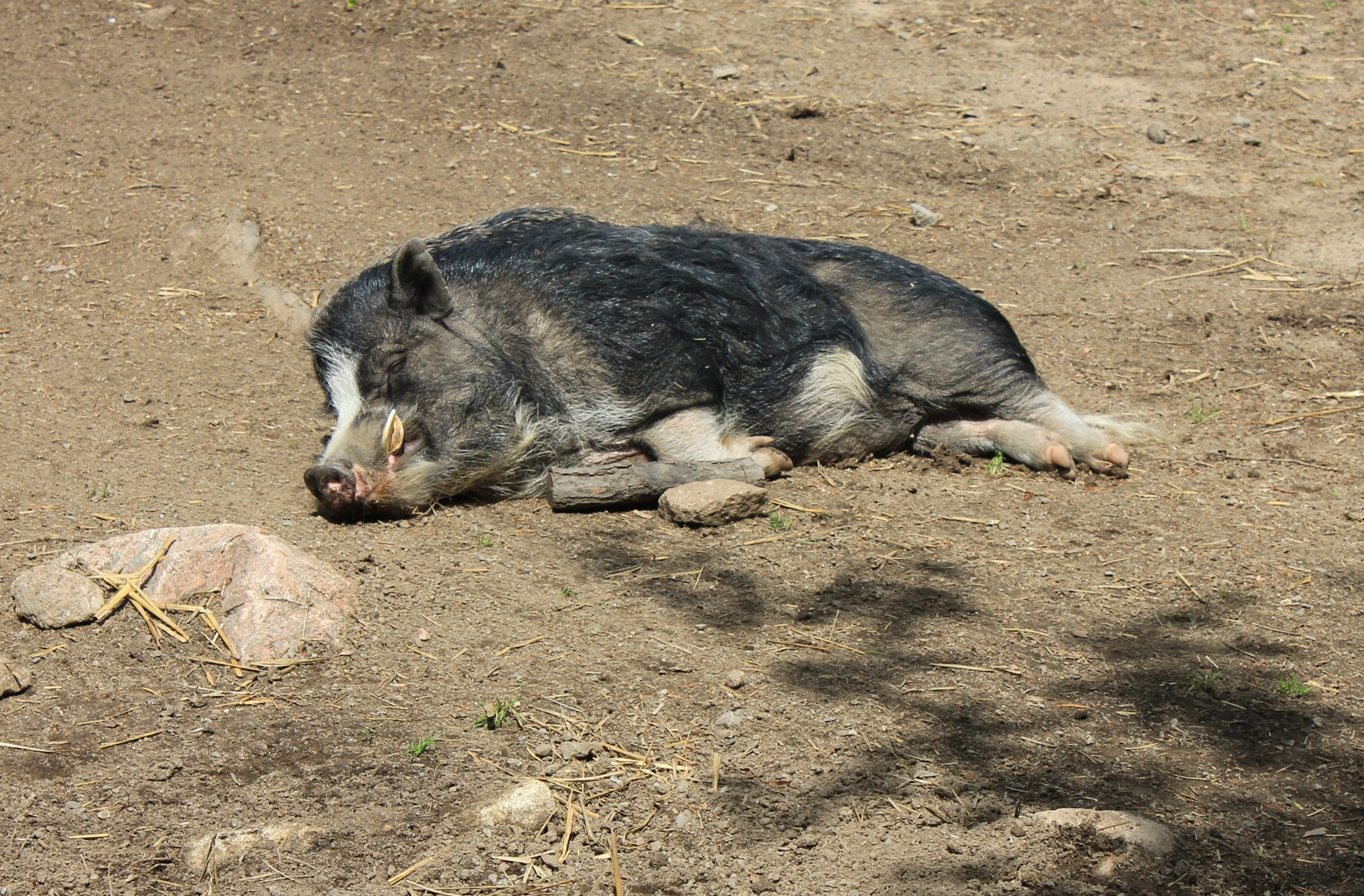 Gammel griseart.